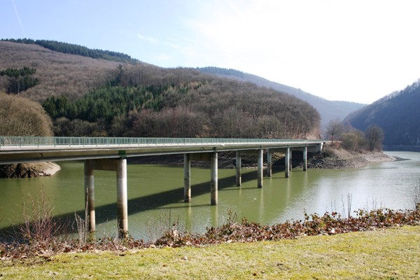 Bréck iwwer de Stauséi vun der Our tëscht Biwels a Veianane.